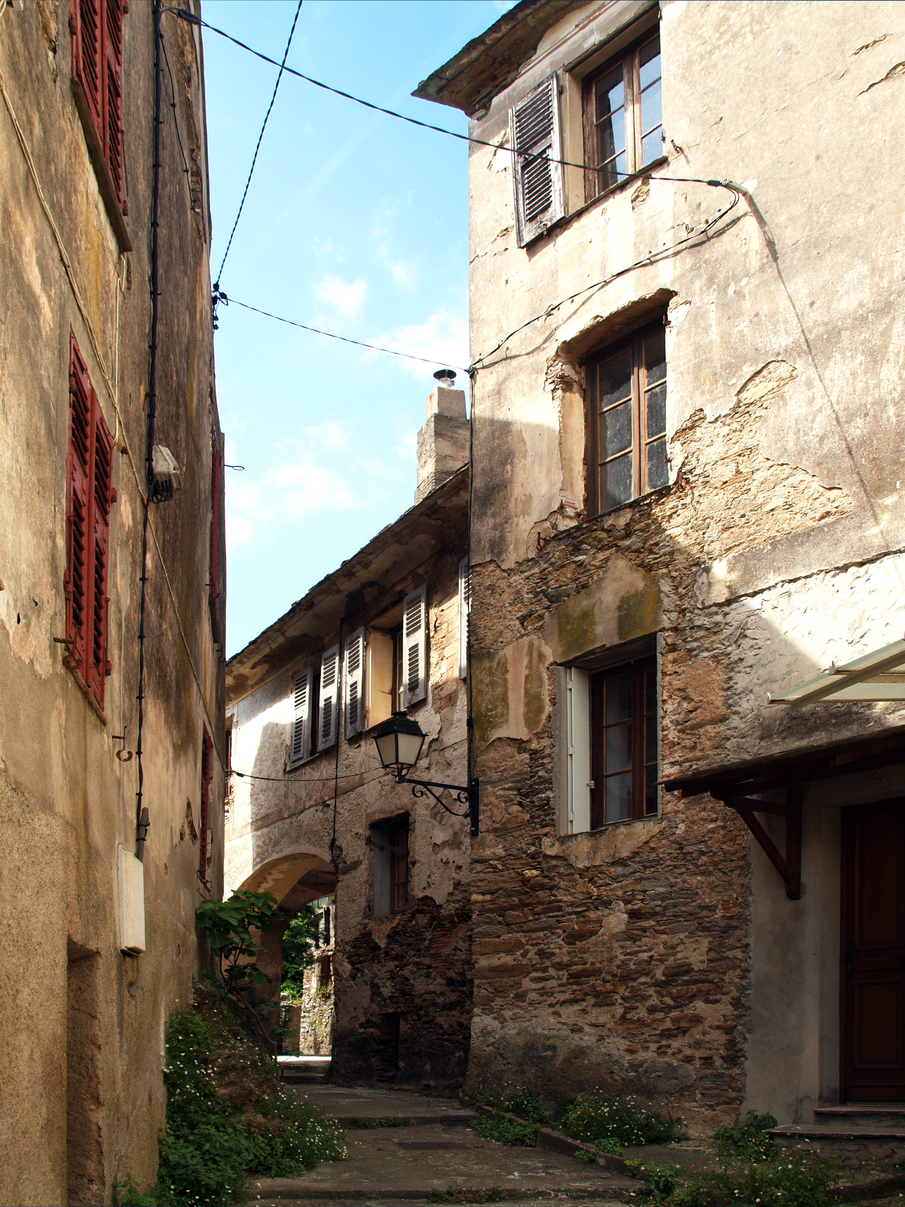 Luri (Corse) - Ruelle de Poggio